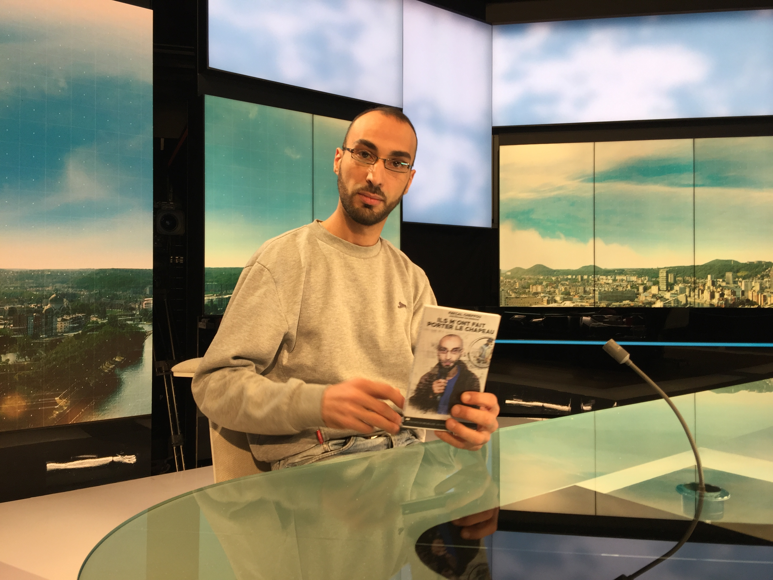 Fayçal Cheffou présentant son livre "Ils m'ont fait porter le chapeau", entretien avec Benjamin Hannesse, au JT de 13 heures de la RTBF (Belgique), mars 2019.